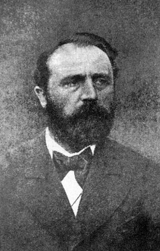 Емелян Партицкий (1840 — 1895) - украинский ученый, педагог, литературовед, этнограф, историк, поэт, общественно-политический деятель